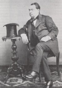 Адам Ганоры Кіркор